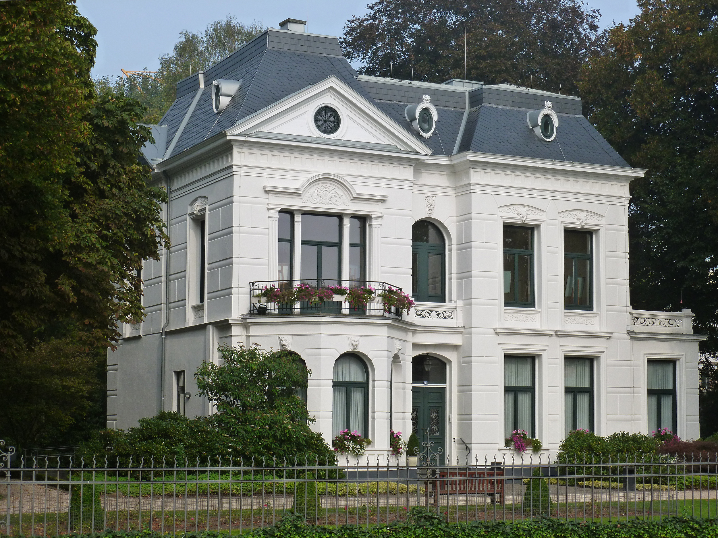 Villa Van Delden an der Bahnhofstraße, Ahaus This is a photograph of an architectural monument.It is on the list of cultural monuments of Ahaus